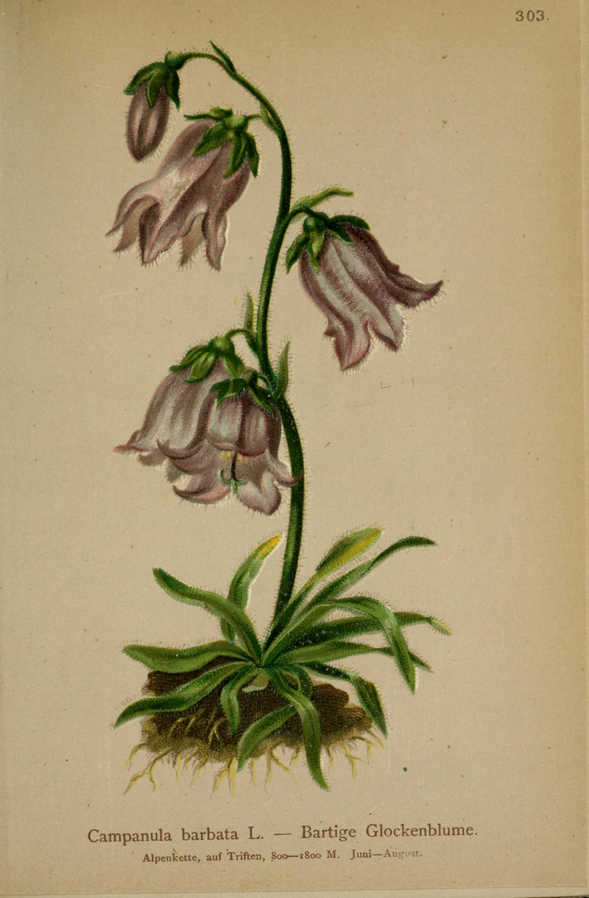 Atlas der Alpenflora / herausgegeben vom Deutschen und Oesterreichischen Alpenverein ; nach der Natur gemalt von Anton Hartinger ; mit Text von K.W. v. Dalla Torre.